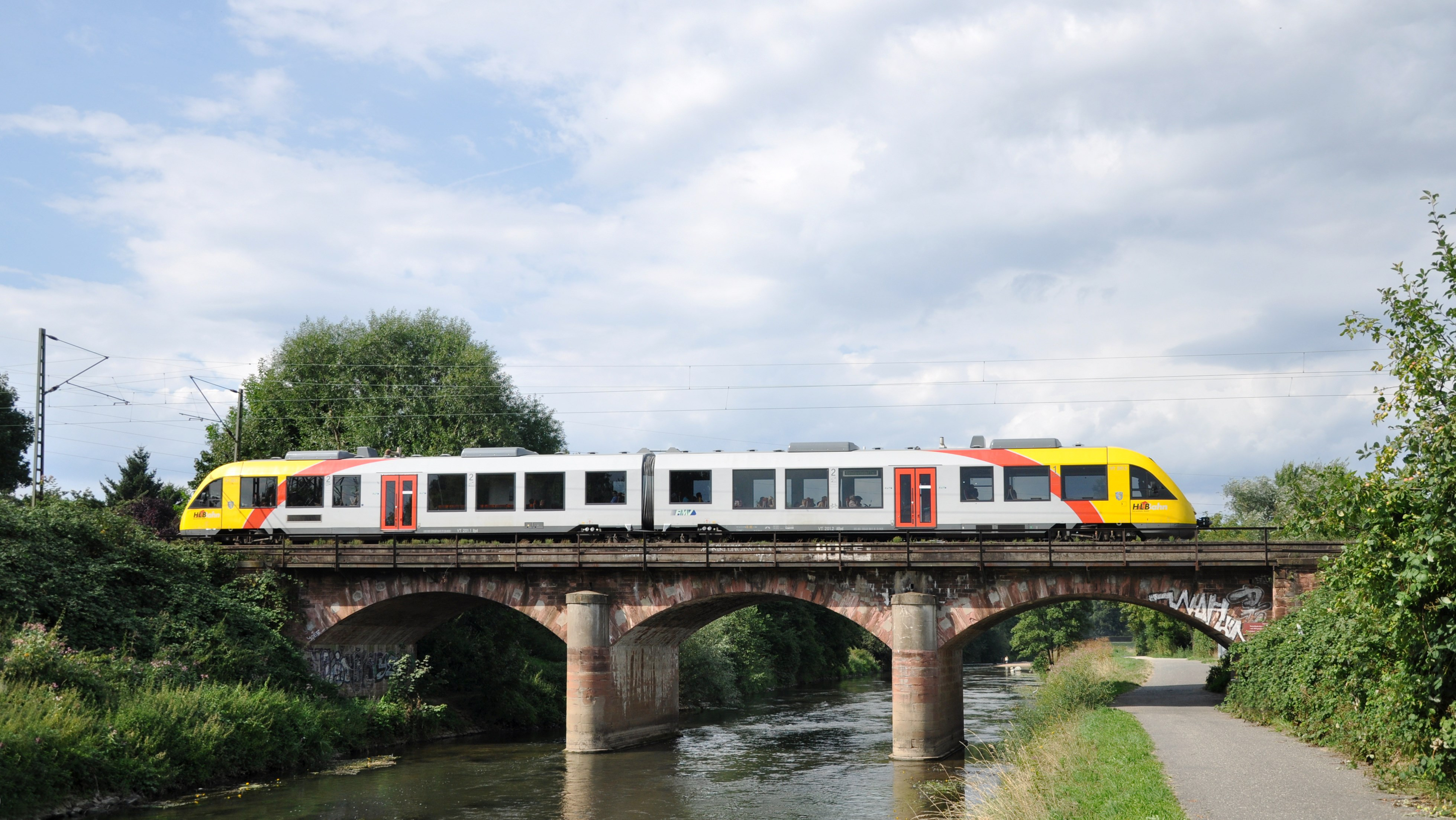 Die Brücke bei Frankfurt-Nied ist die älteste noch in Betrieb befindliche Eisenbahnbrücke in Deutschland (Eröffnung war 1838).